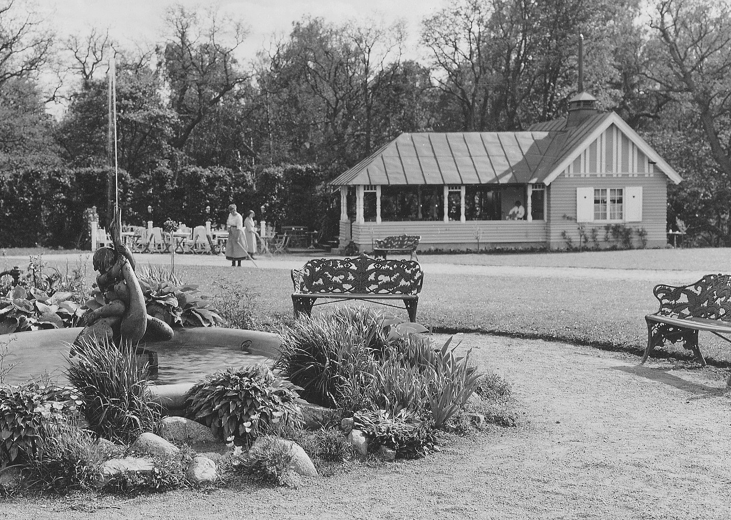 Rosendals värdshus "Terrassen". Till vänster "Gosse lekande med svan" av Theodor Lundberg, som restes på platsen 1922